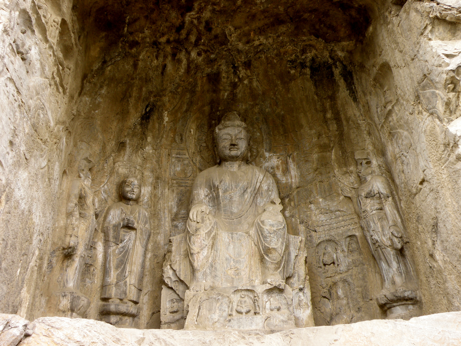 洛阳龙门石窟，Luo Yang Dragon Gate Grottoes